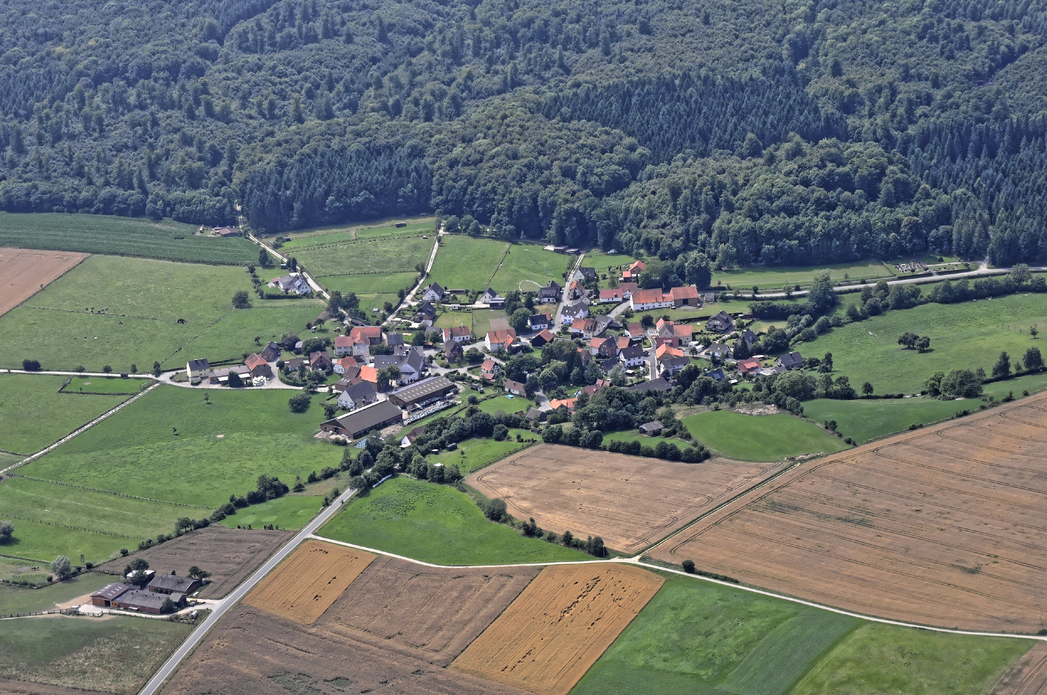 Bilder vom Flug Nordholz-Hammelburg 2015: Erwitzen